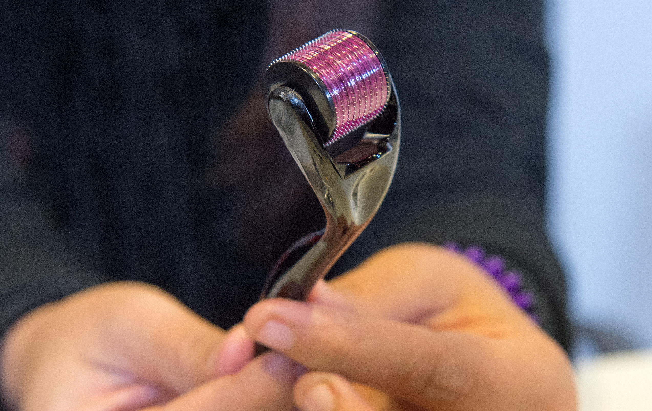 TOLEDO, 23 de noviembre de 2018.- El director general de Salud Pública y Consumo, Manuel Tordera, presenta, en la sala de prensa de la Consejería de Sanidad, un estudio sobre el riesgo que supone la venta a las personas consumidoras de equipos dotados de un sistema de micro agujas para la perforación de la piel y aplicación de determinadas sustancias en tratamientos estéticos. (Fotos: Carlos Monroy // SESCAM)